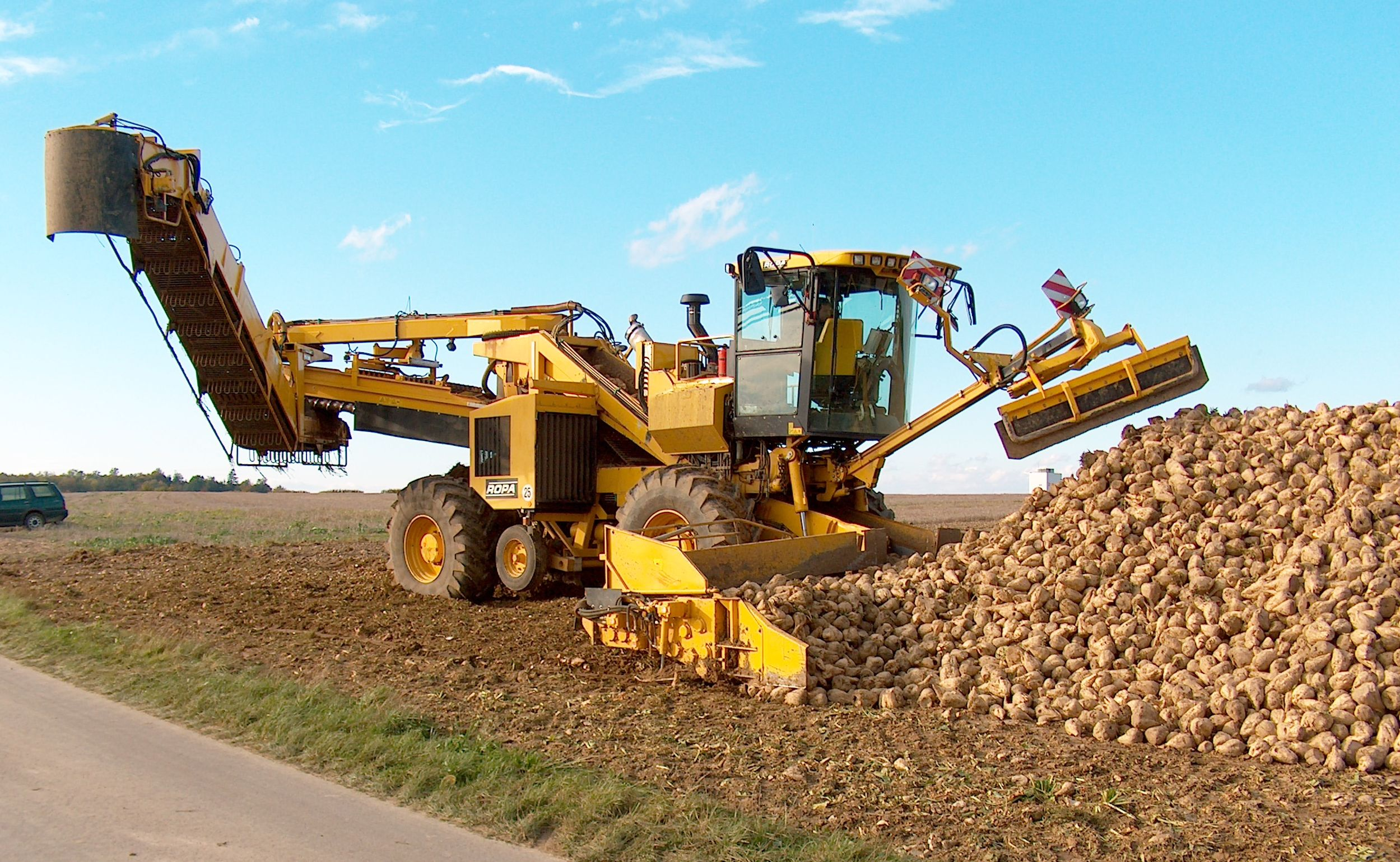 Rübenernter Euro-Maus der Firma Ropa